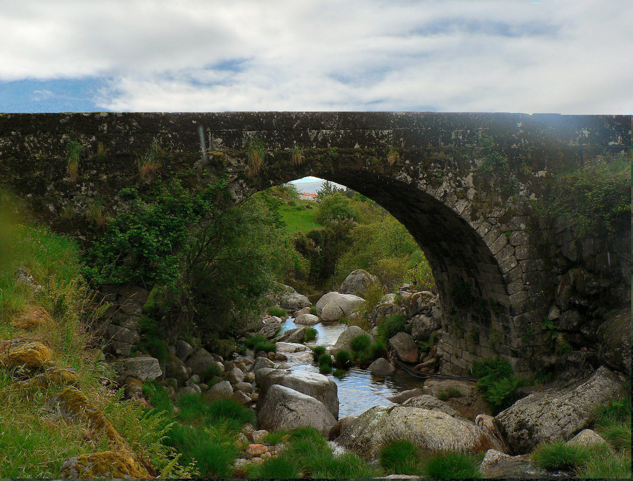 Ponte Romana em Loriga